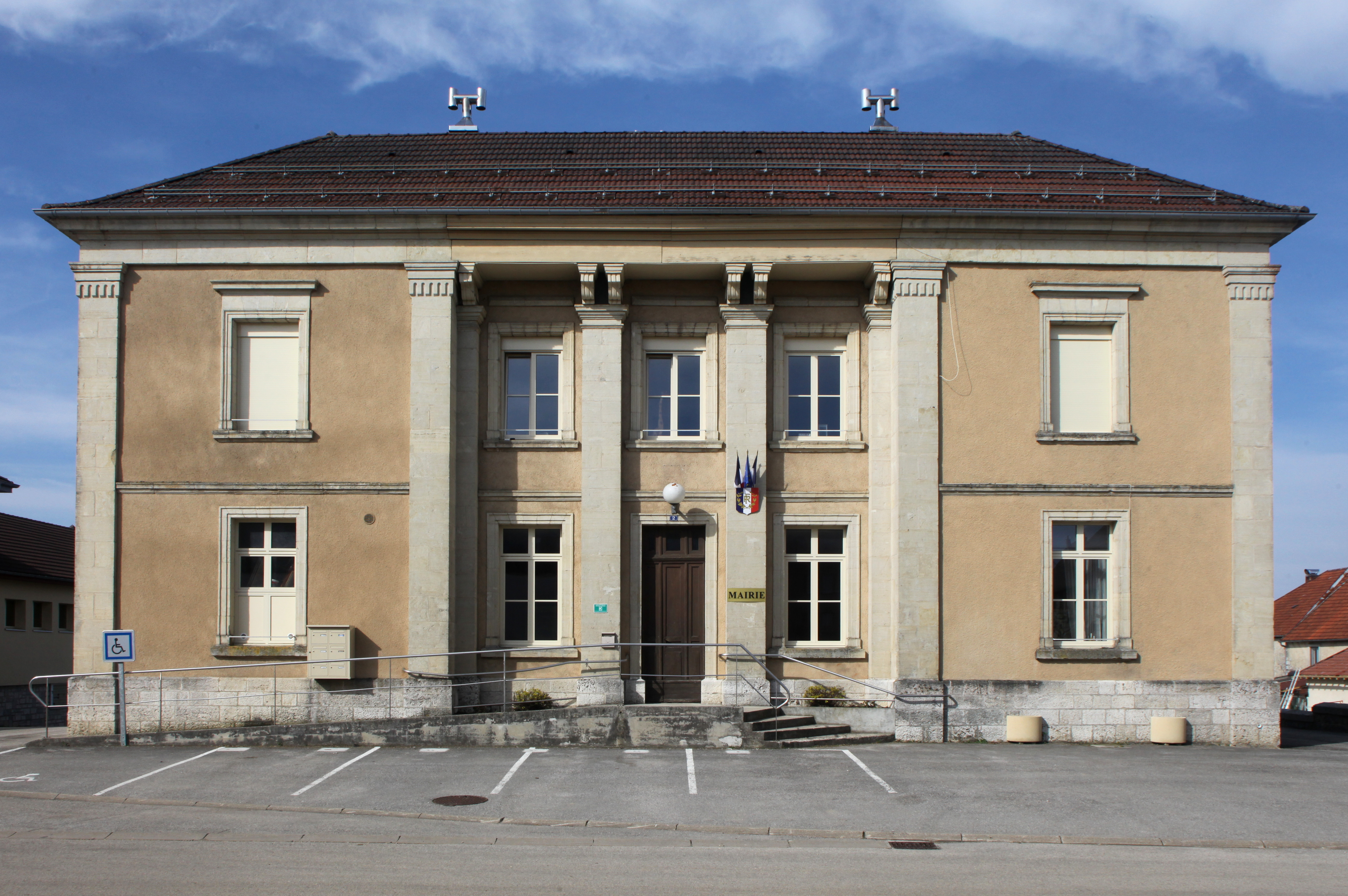 Mairie de Courvières (Doubs).